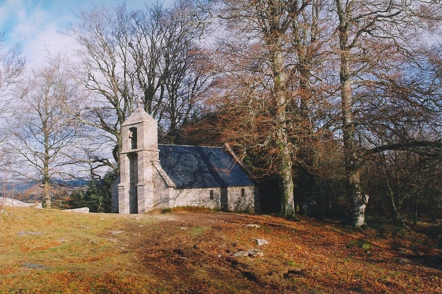 chapelle du Rat - Peyrelevade Correze